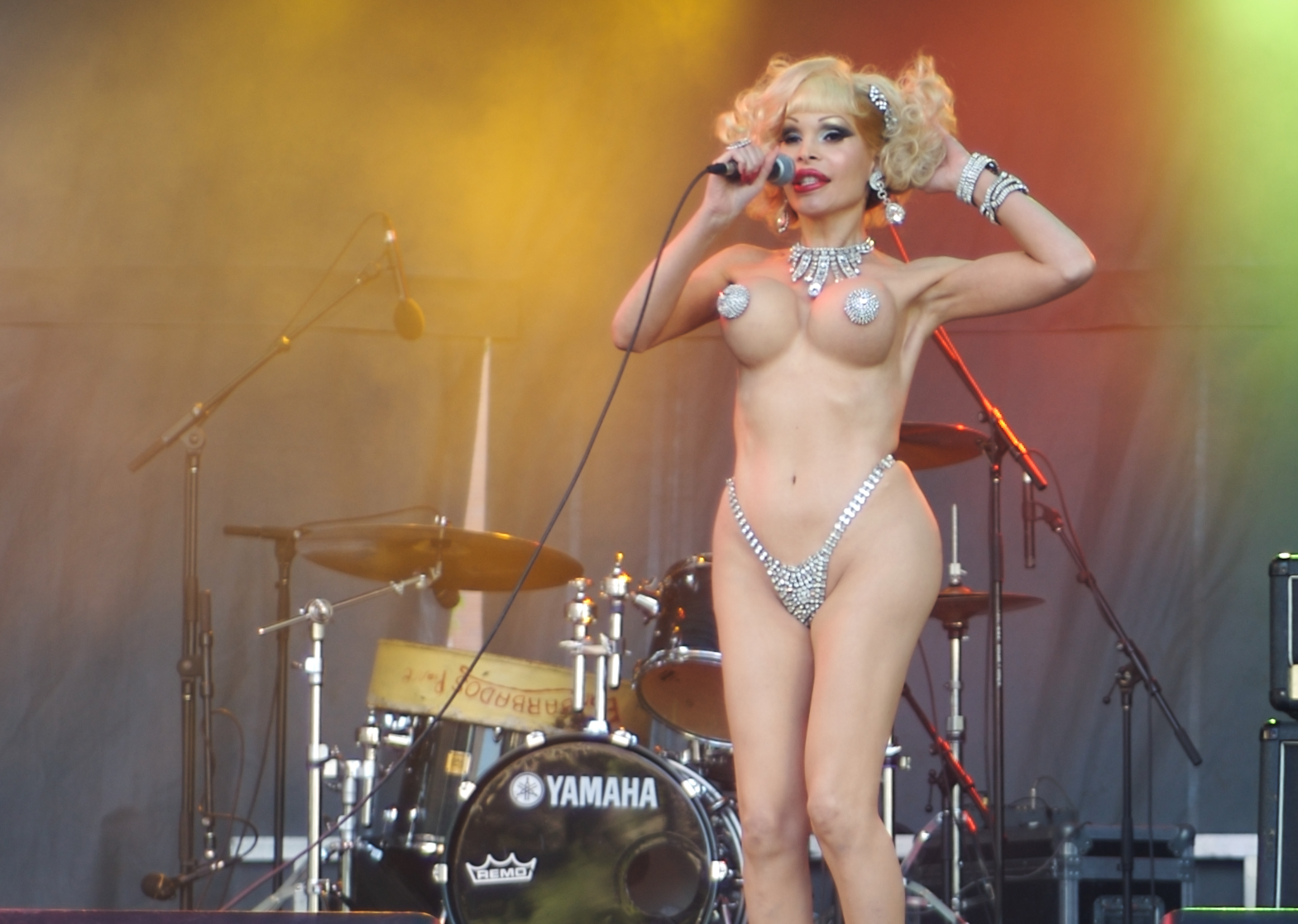 Amanda Lepore, Montreal Pride 2006, Sex Garage 2. Hindi: अमांडा लेपोर छातियाँ बताती हुई